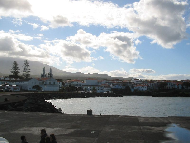 Hafen von Madalena.